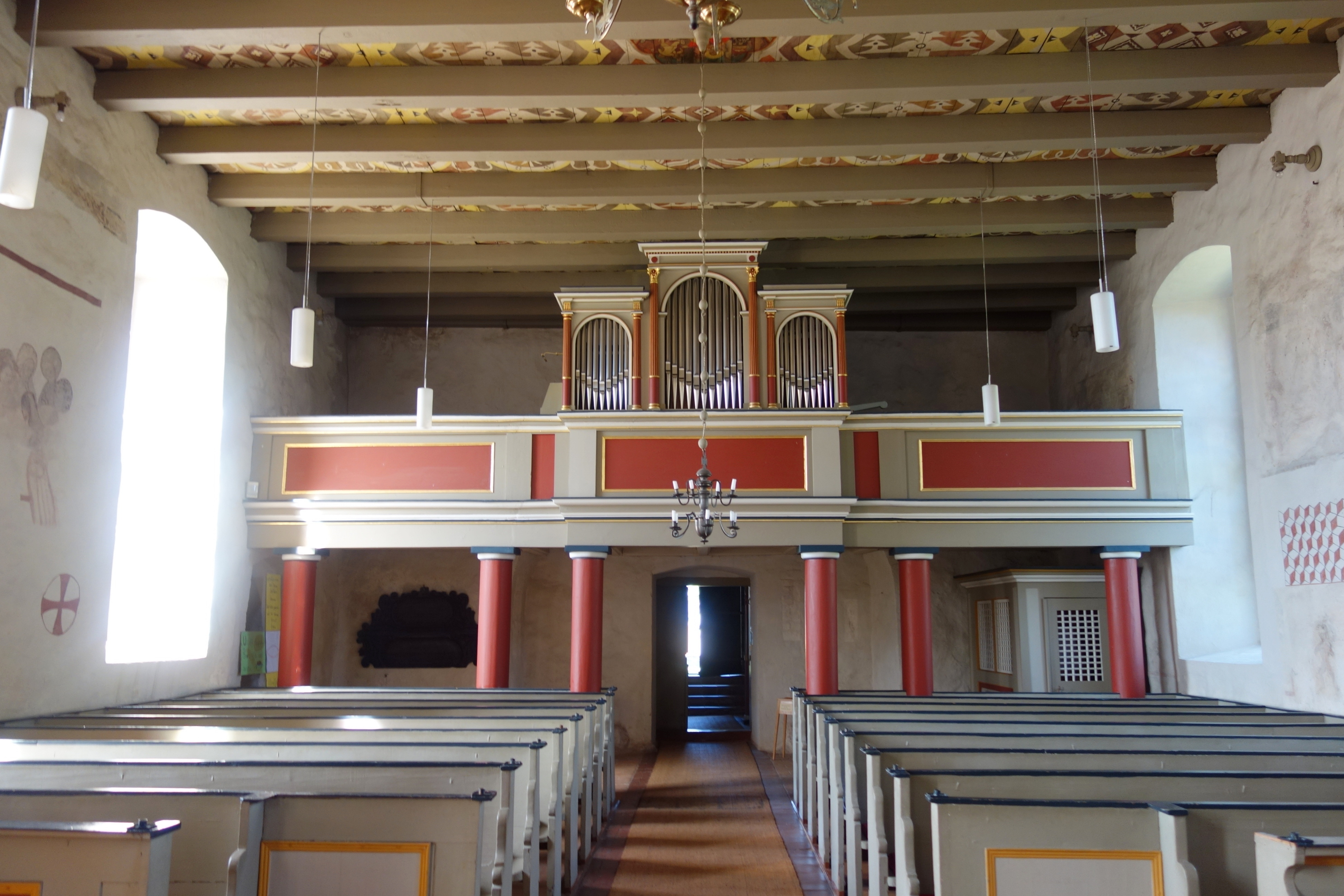 Kirche Herzberg (Mark), Landkreis Ostprignitz-Ruppin, Brandenburg, Deutschland